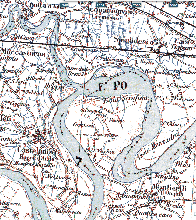 Porzione di "Carta topografica d'Italia alla scala 1:100 000 - Foglio 60 - Piacenza - Ed. 1907, a tre colori, con orografia a curve di livello"